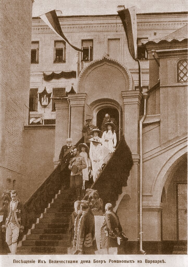 Москва. 300-летие Дома Романовых. Посещение императорской семьёй дома Бояр Романовых. Журнал «Нива», № 24 за 1913 год